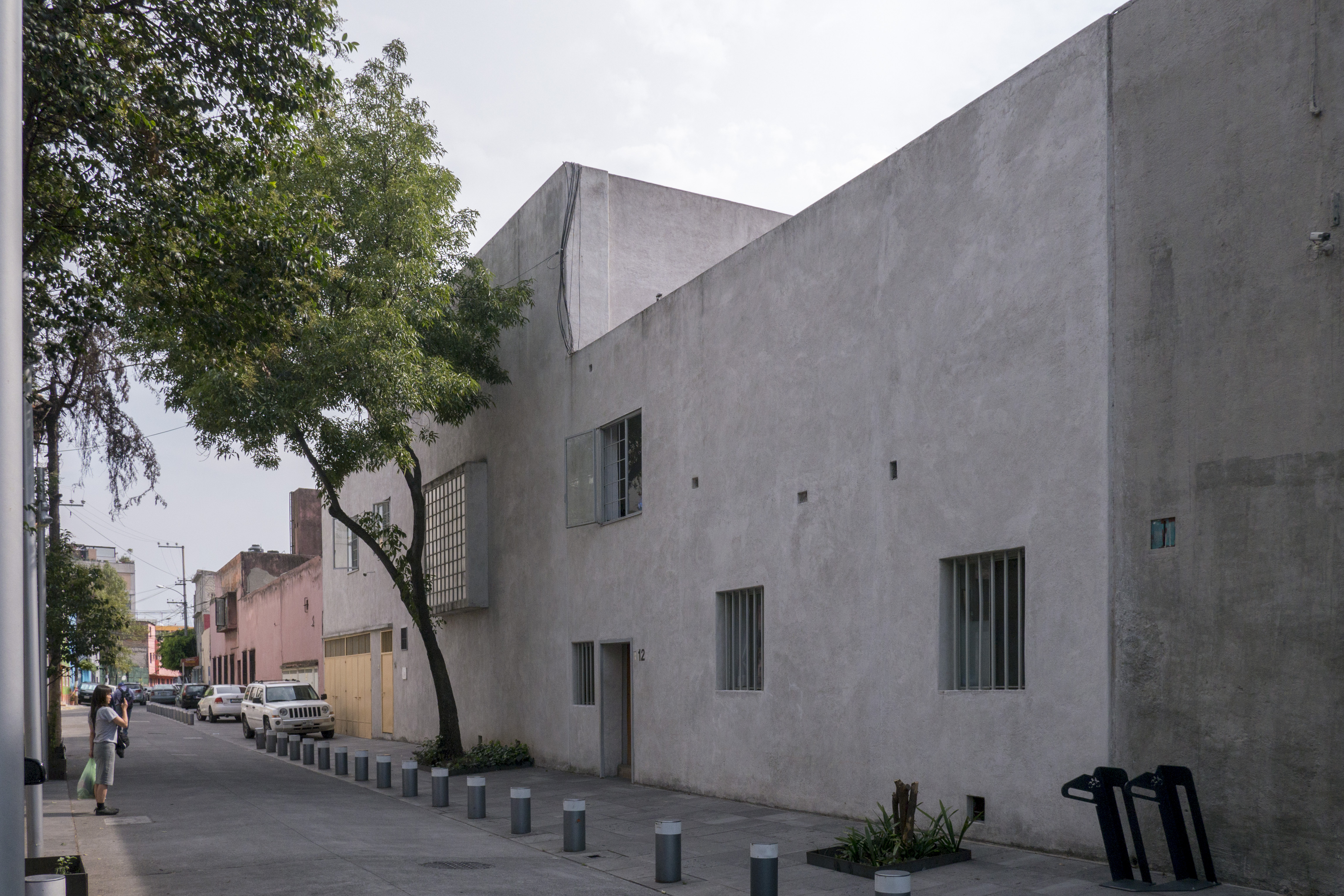 Luis Barragán House and Studio Street view